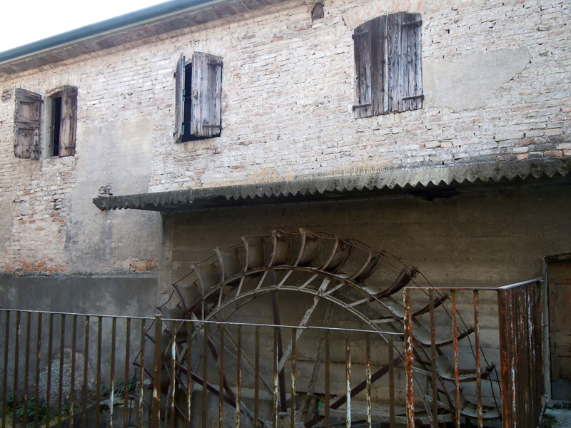 Casalodo, frazione Molinello, il mulino.